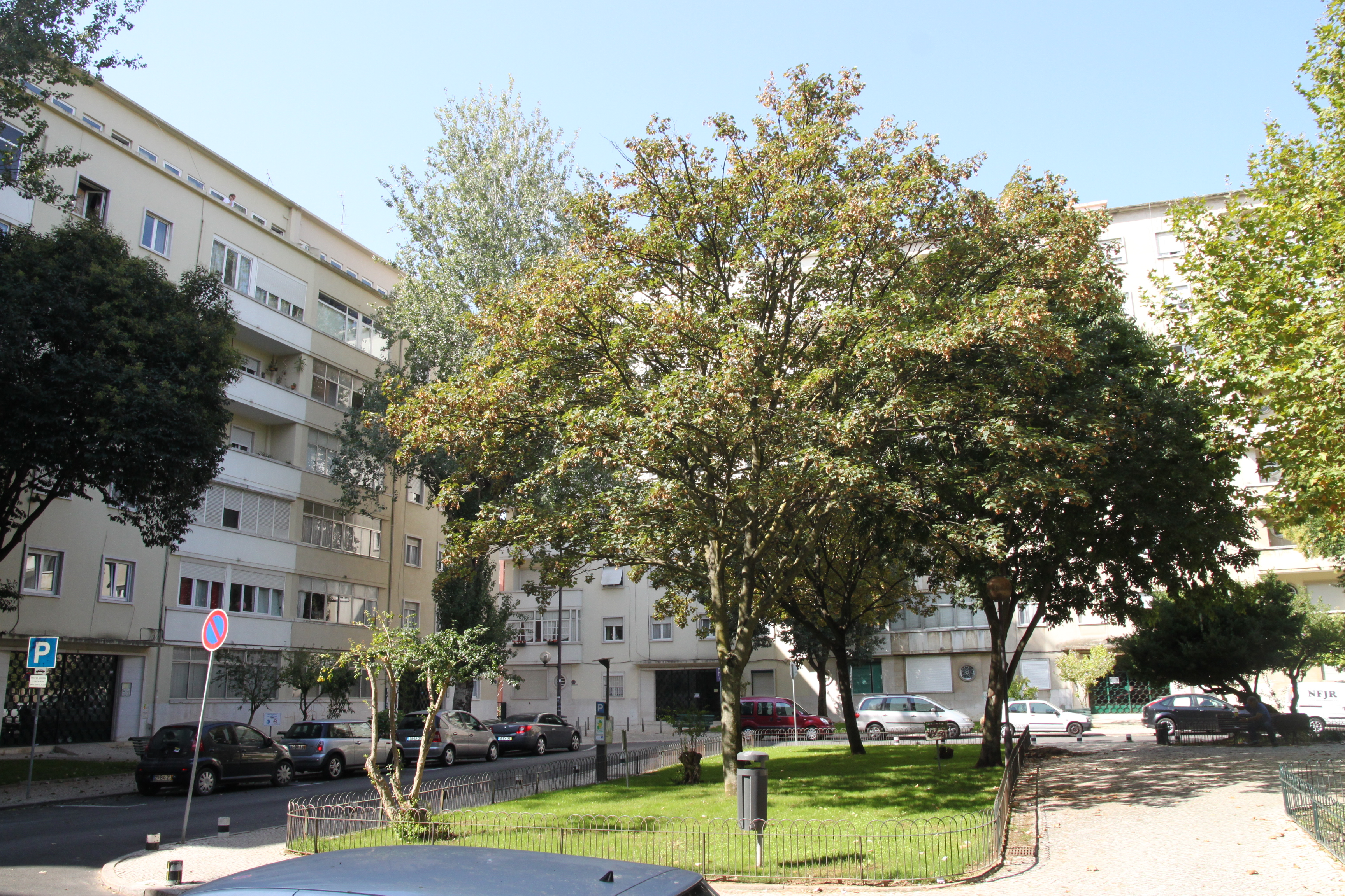 Jardim da Praça Pasteur This file was uploaded for Wiki Loves Monuments in Portugal with the unique identifier 97026715.